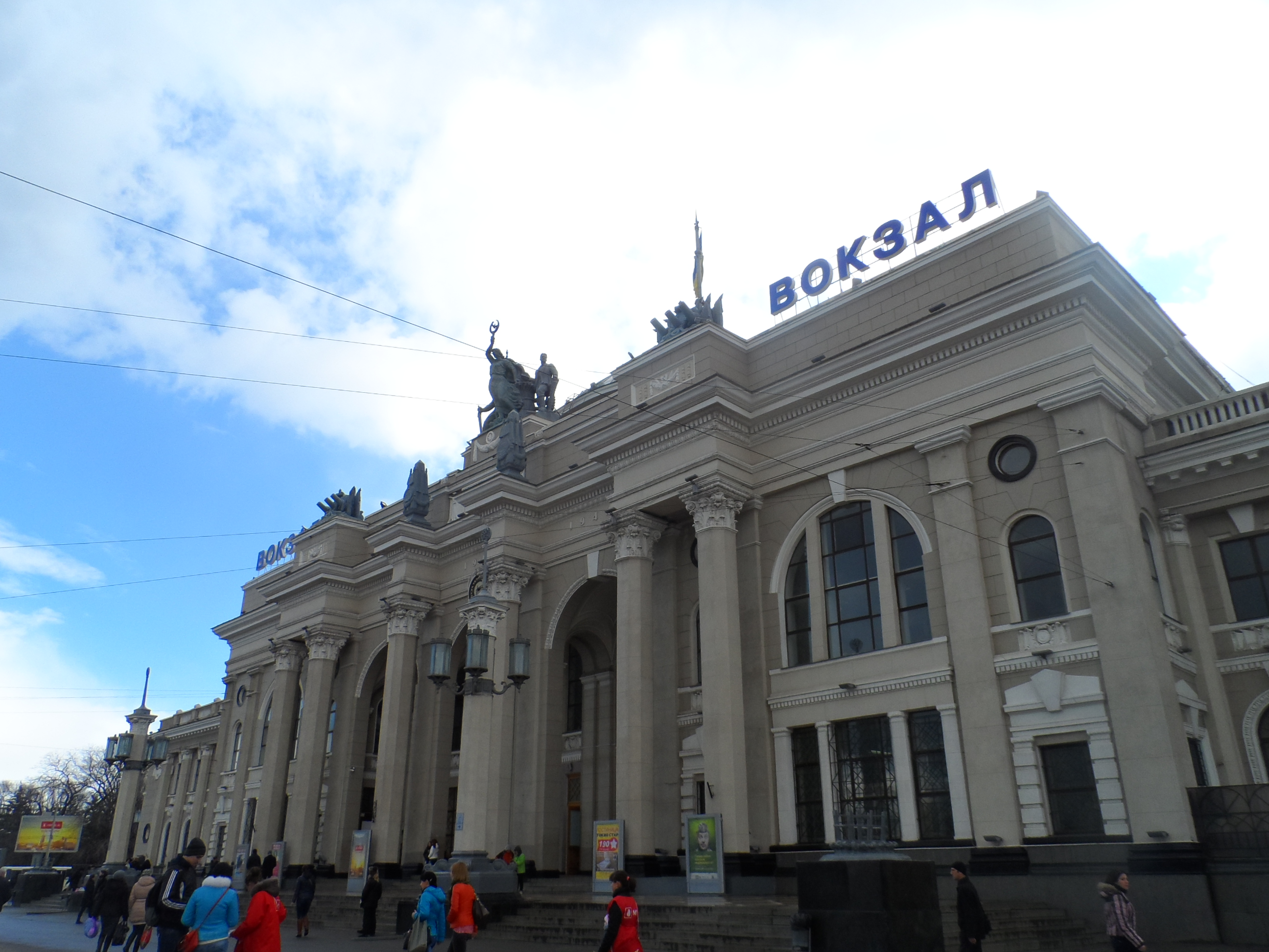 Вокзал